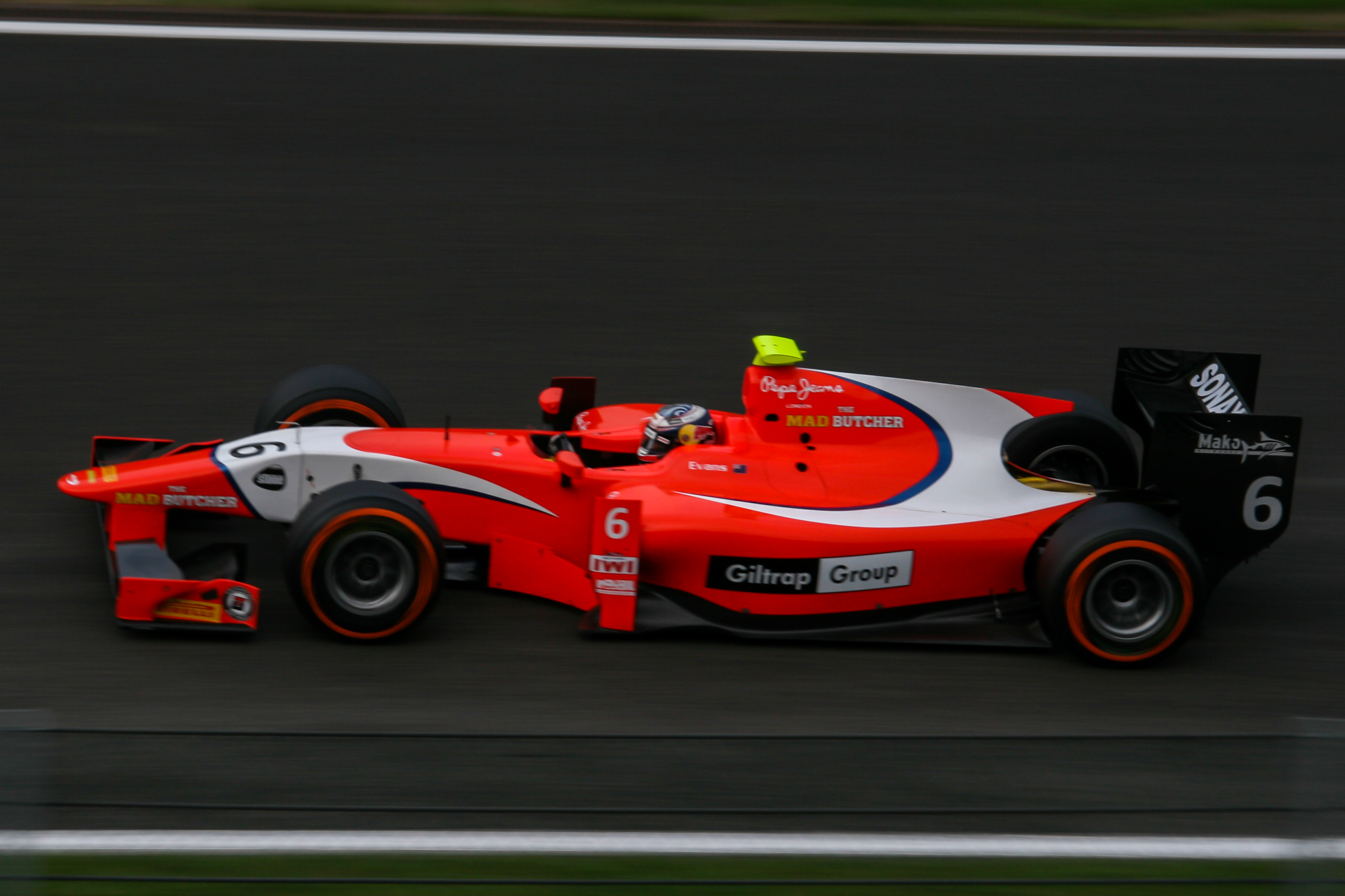 Mitch Evans beim Sprintrennen der GP2-Serie in Spa-Francorchamps 2013.